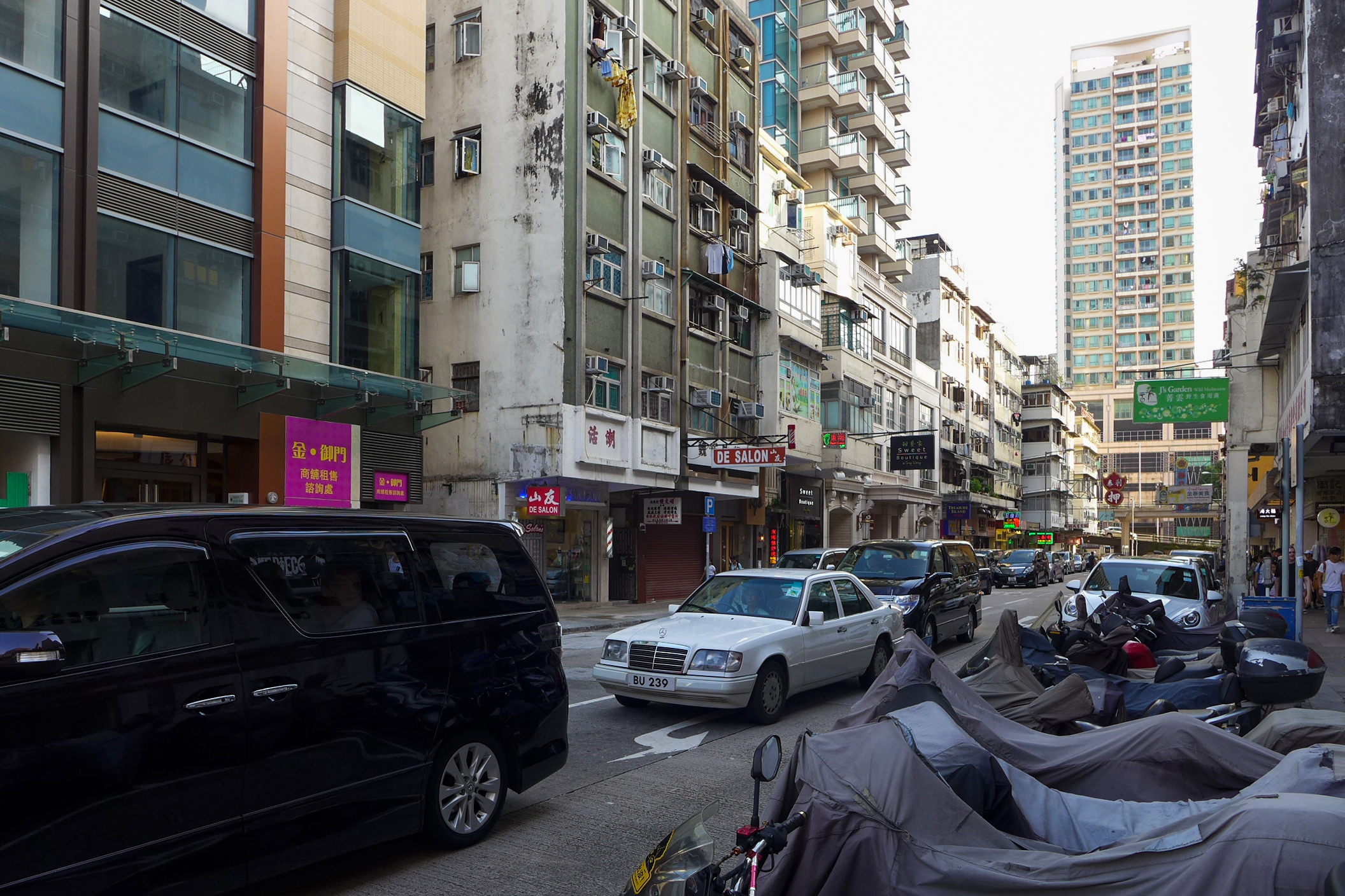 Hau_Wong_Road near Nga Tsin Wai Road